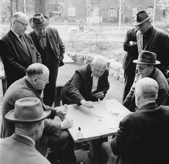 Erfurt, Skatspieler im Park Zentralbild Demme 28.5.1967 Im Stadtpark von Erfurt ...kann man seit den ersten warmen Frühlingstagen als Kiebitz einen zünftigen Rentner-Skat beiwohnen. Fast täglich, wenn es das Wetter erlaubt, treffen sich die "älteren Herren" der nächsten Umgebung an ihren "Stammtischen" in der Hoffnung auf einen "Grand mit Vieren", wobei gleichzeitig Lebenserfahrungen und Skatweisheiten ausgetauscht werden.